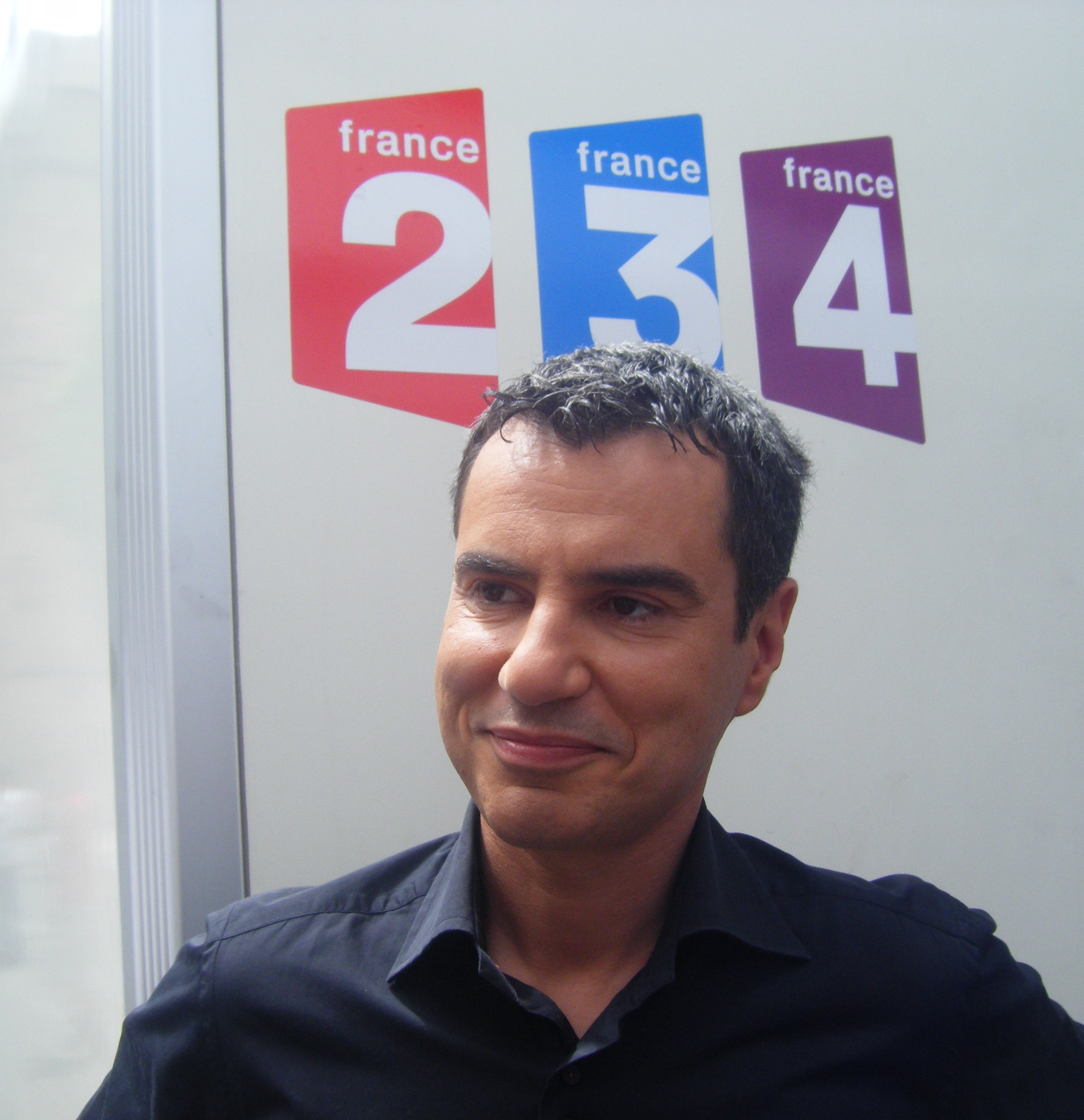 Laurent Luyat sur le boulevard d'Estourmel le 17 juillet 2010 après y avoir animé l'émission de divertissement Village départ sur France 3 depuis la place d'Armes à Rodez dans le cadre de la 13e étape du Tour de France 2010.